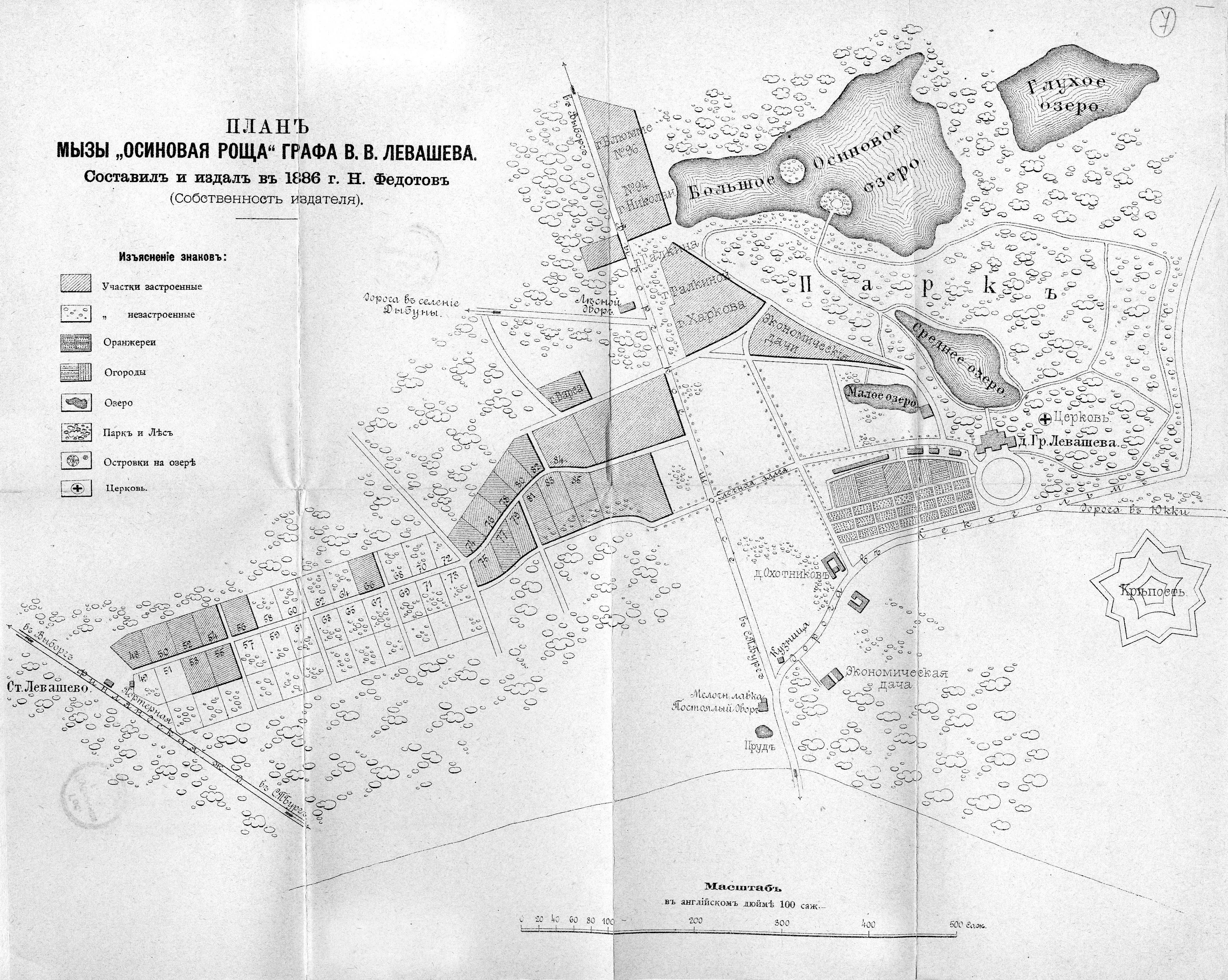 План мызы "Осиновая Роща" графа В. В. Левашева.